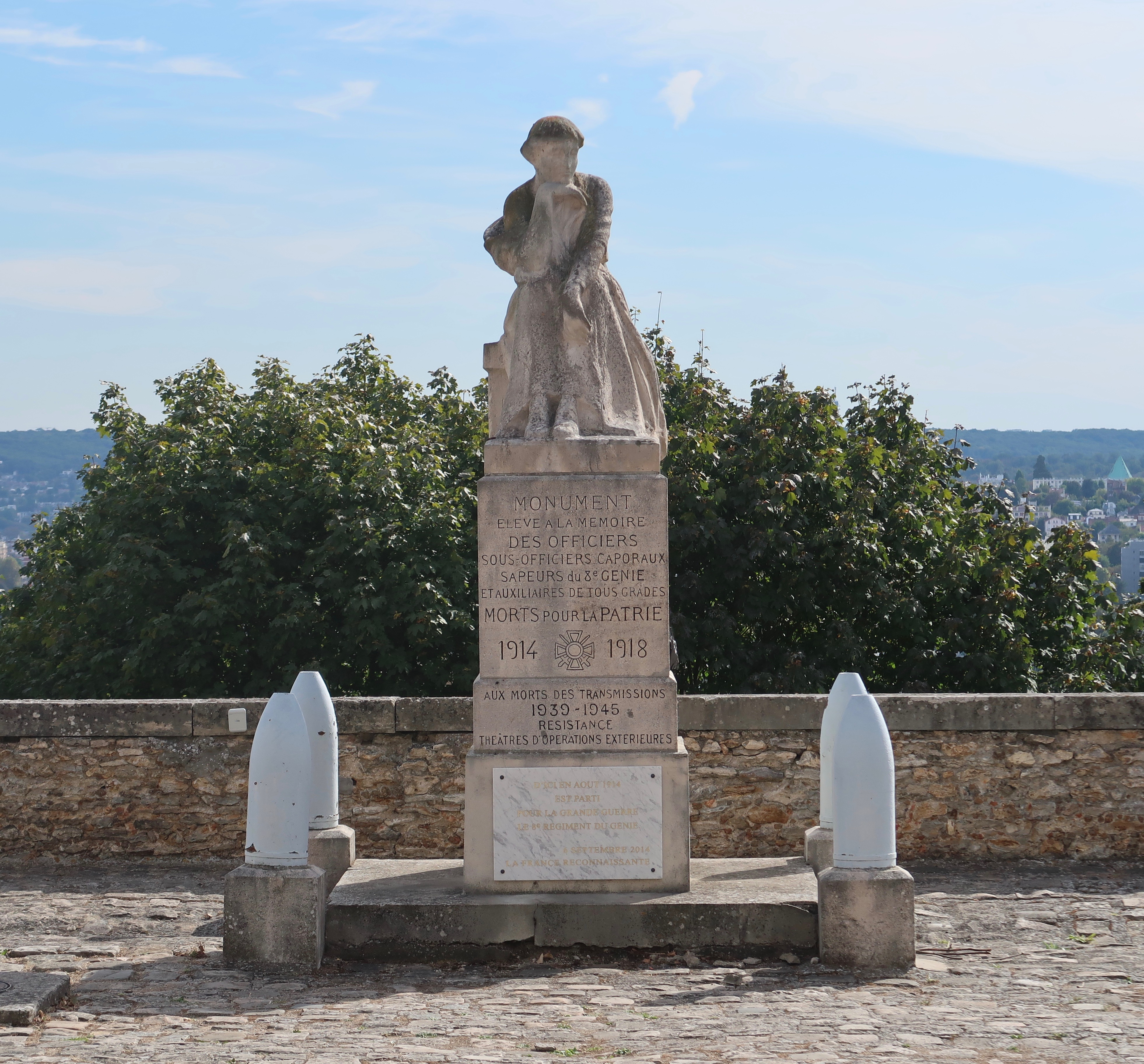 Monument aux morts du 8e régiment du génie pour les deux guerres mondiales, dans la forteresse du mont-Valérien (Suresnes, Hauts-de-Seine).